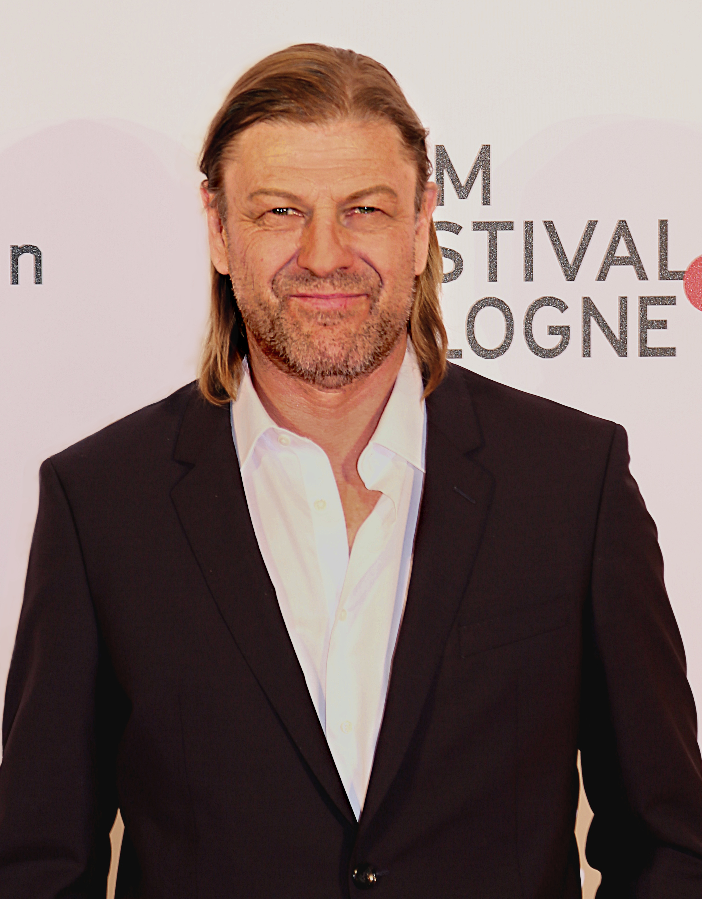 Sean Bean bei der Verleihung der "Film Festival Cologne Awards 2017".